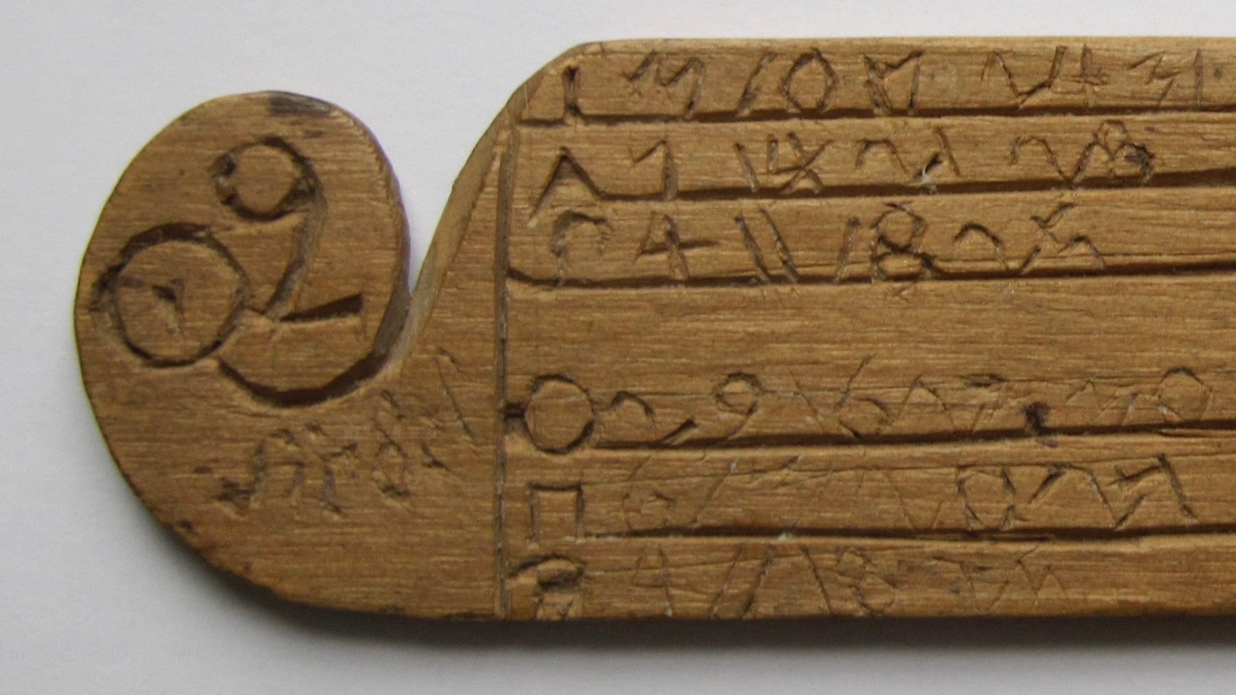 Yksityiskohta Harlundin puualmanakasta